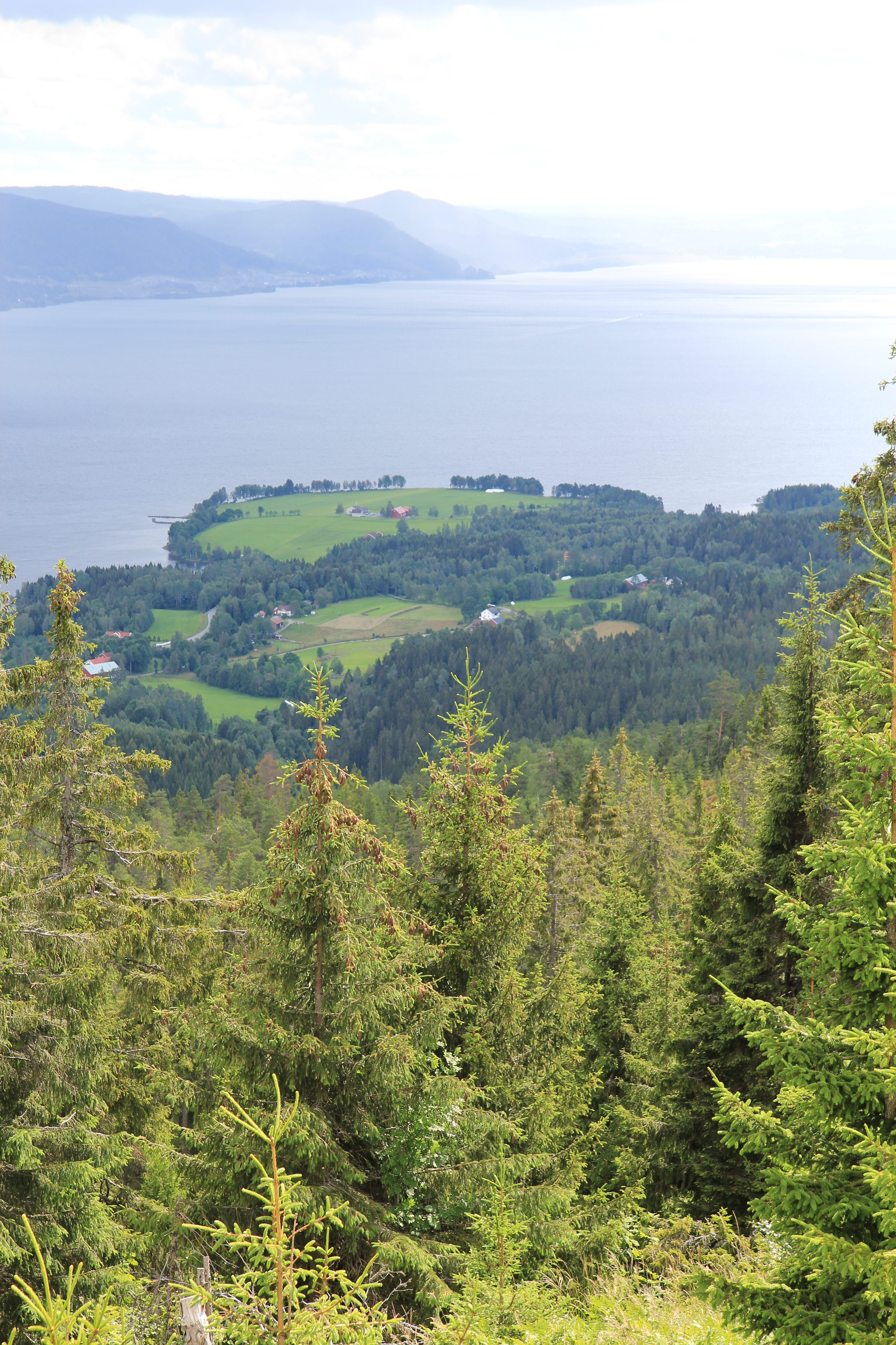 Mjøsa med Feiring sett nordfra og sørover.